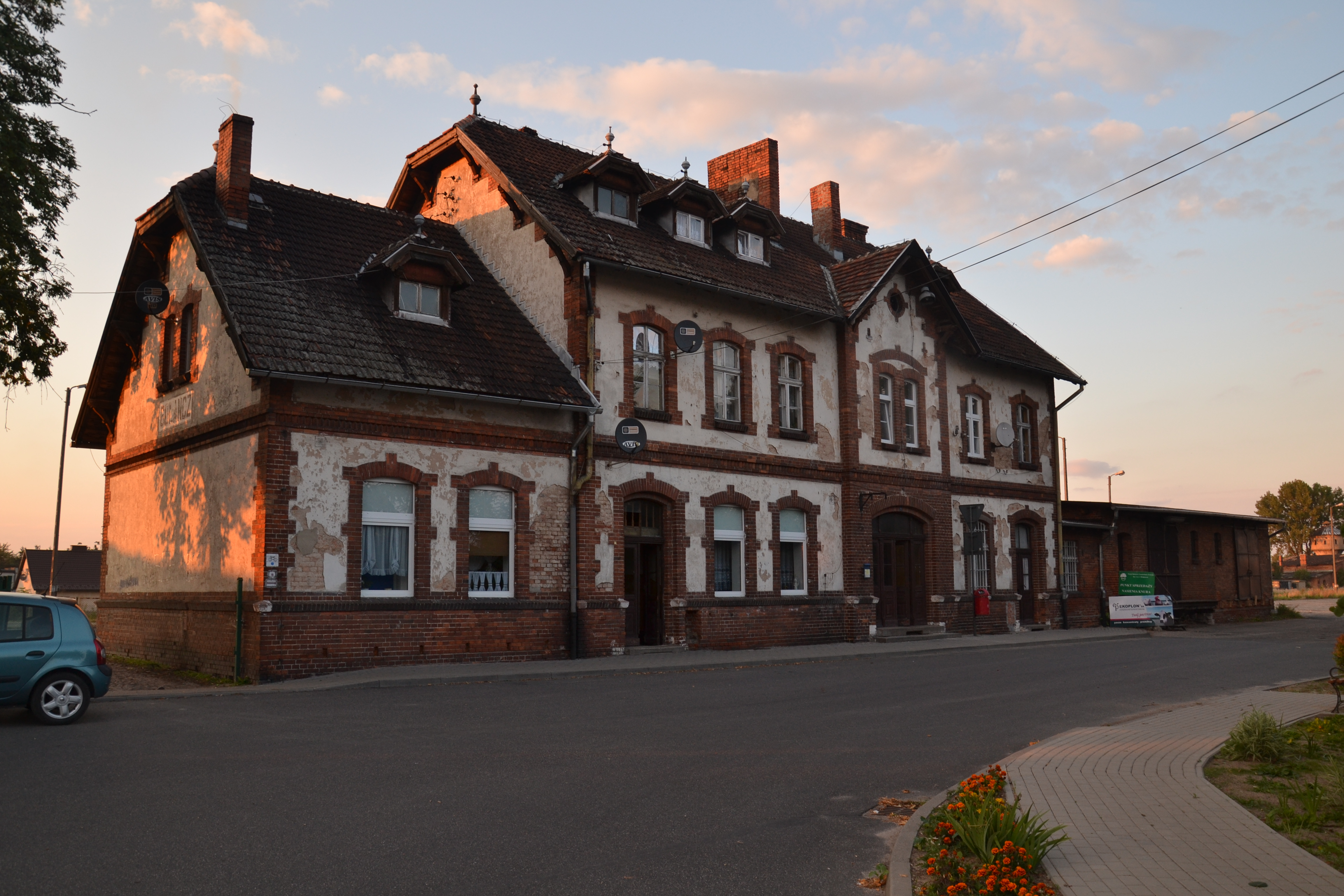 Widok budynku stacyjnego od strony Gołańczy